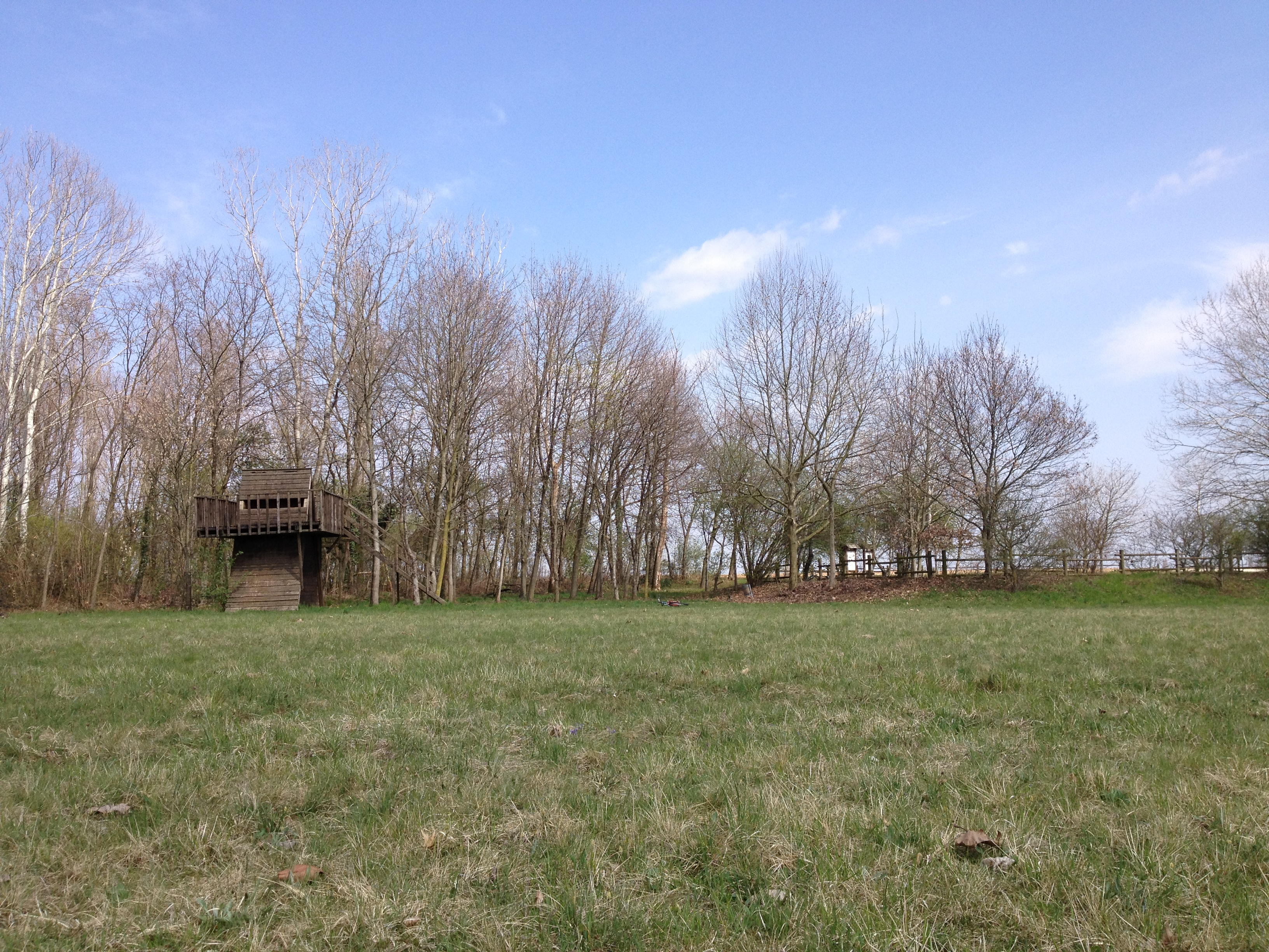 Foto di F. Curridor. Flaibano, vista dei prati di Coz verso Est